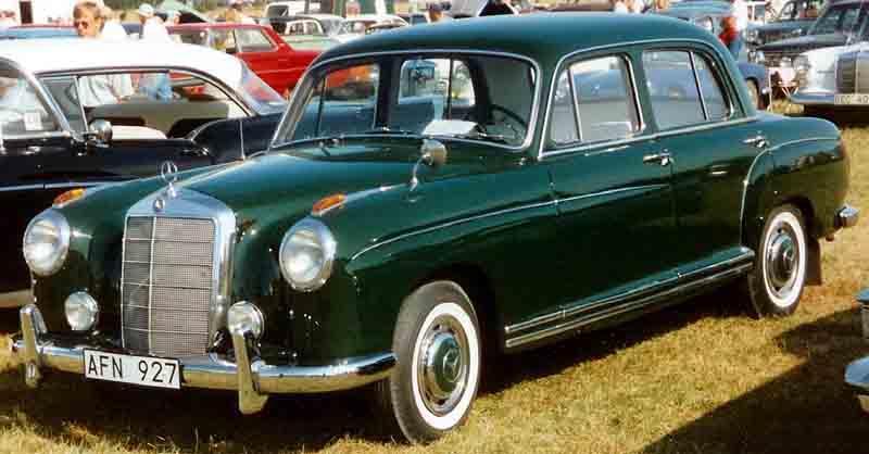 Mercedes-Benz 220 Limousine